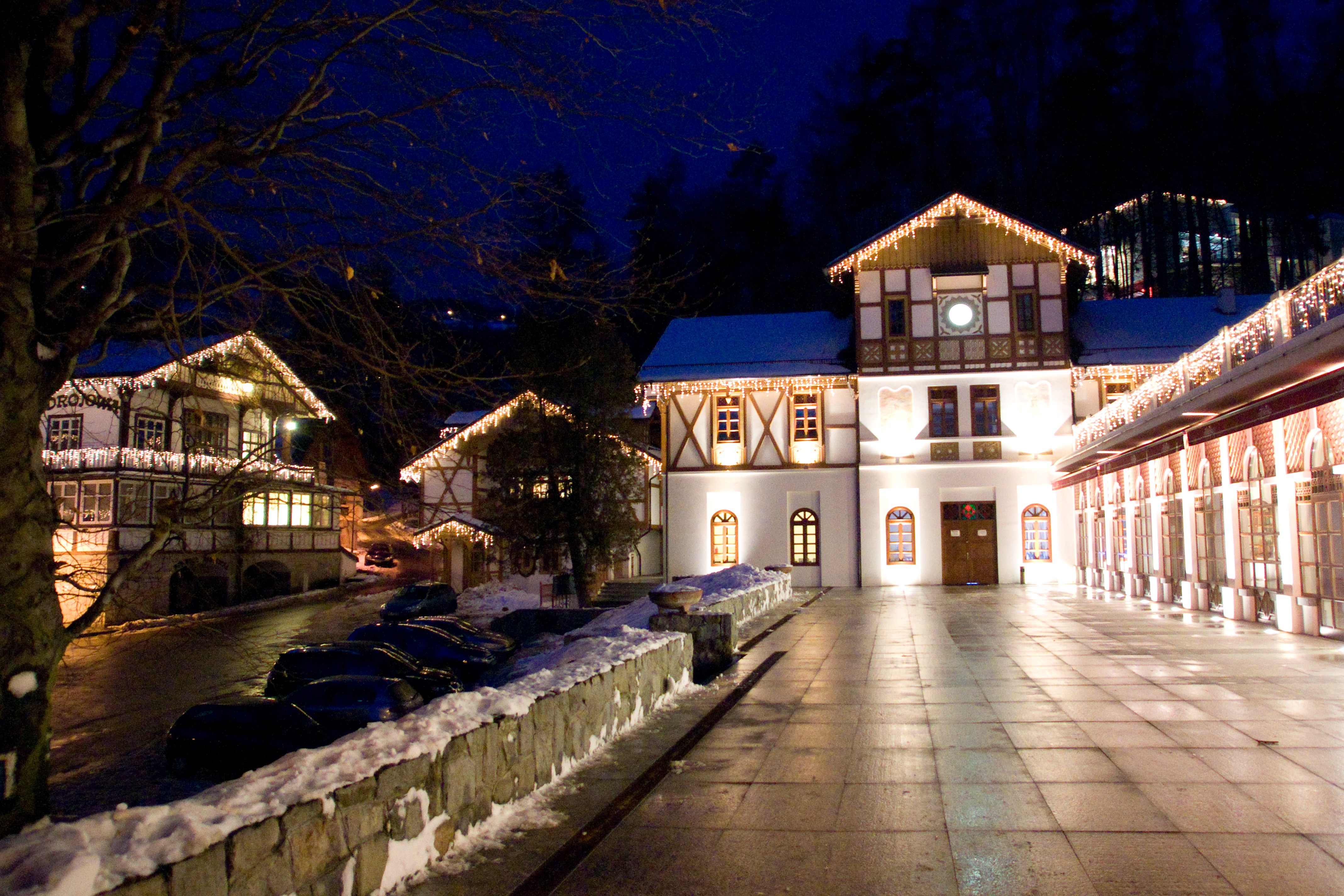 Zabytkowe centrum SZCZAWNICY ZDROJU